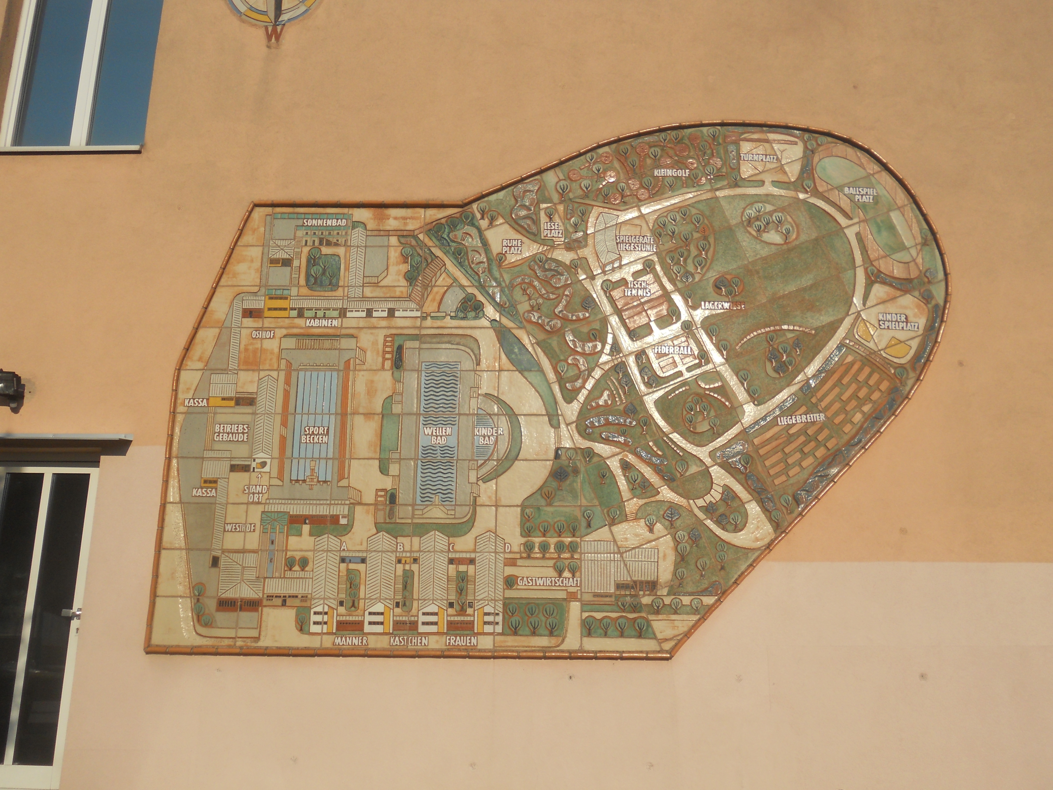 Einer der beiden keramischen Orientierungspläne an der Wand des Eingangsgebäudes des Laaerbergbades